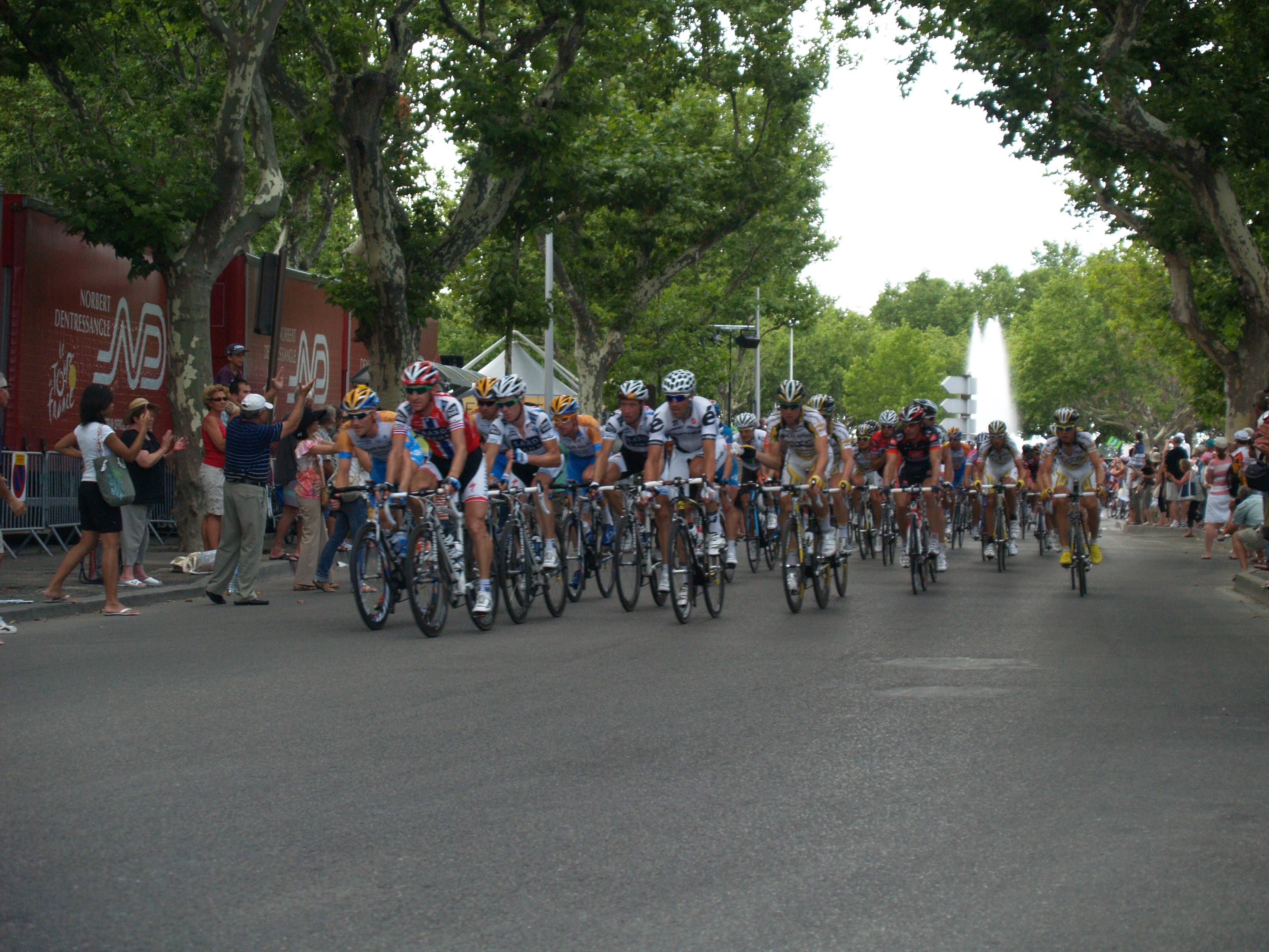 Peloton du Tour de France 2009 à Arles.